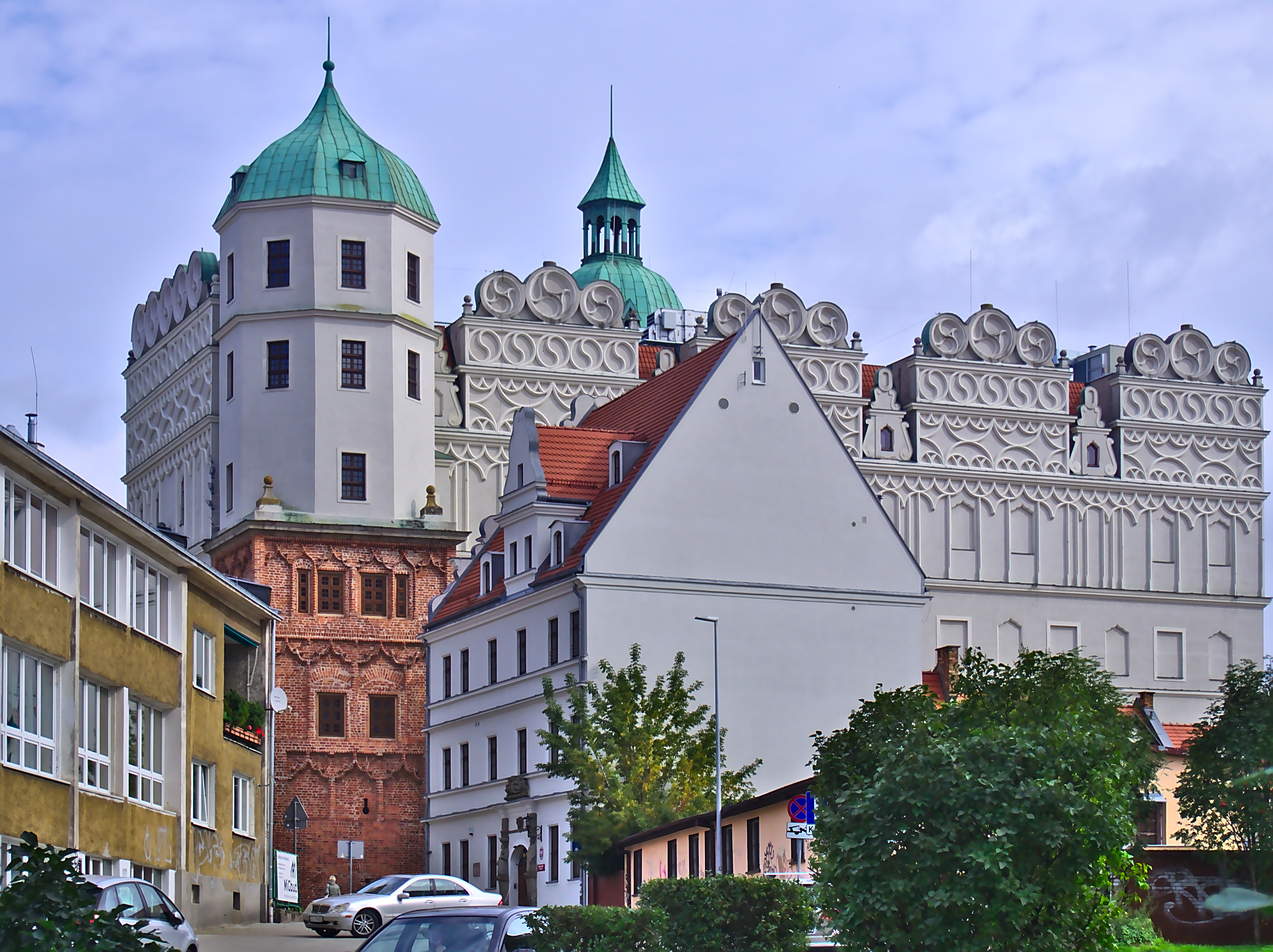 Szczecin, Zamek książąt pomorskich Wikidata has entry Q33304445 with data related to this item.